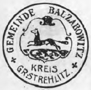 Altes Siegel des Ortes Balzarowitz im Kreis Groß Strehlitz, Schlesien.